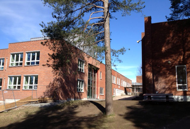 Tonsenhagen skole i Oslo